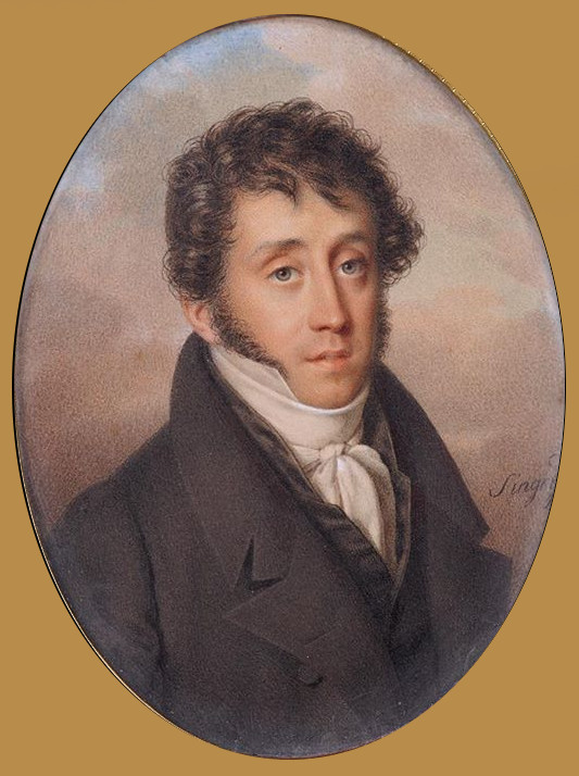 Carlos Miguel Fitz-James Stuart, XIV Duque de Alba